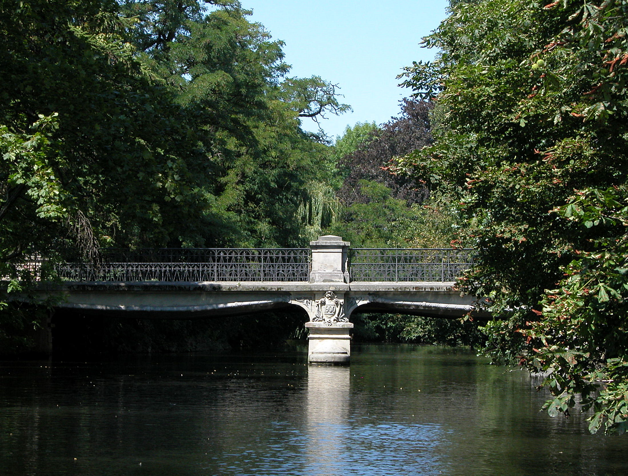 Braunschweig: Ferdinand-Brücke von der Oker aus gesehen.